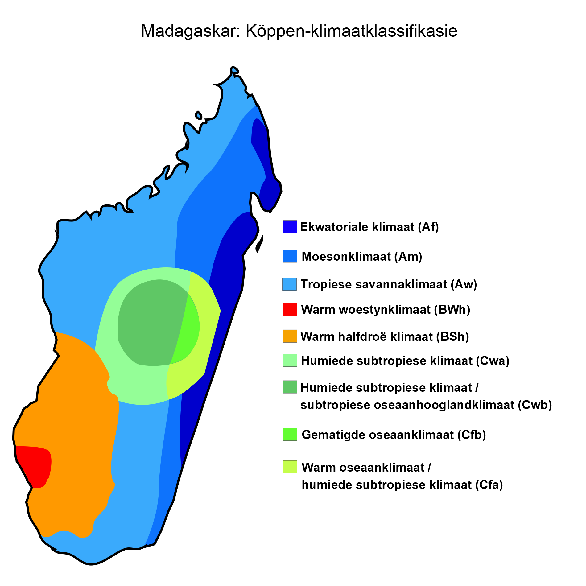 Koppen-Geiger-klimaatkaart van Madagaskar.